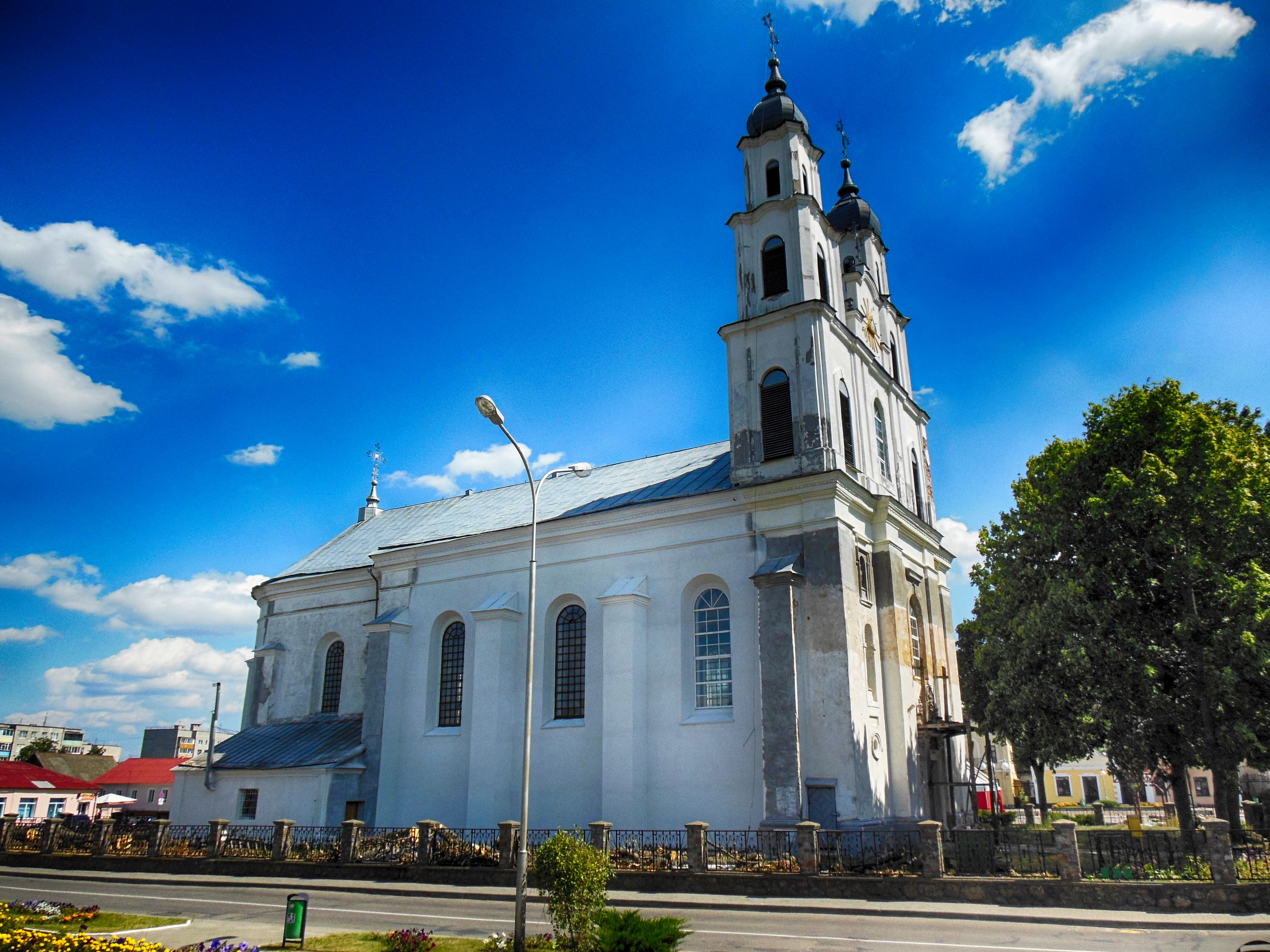 Беларуская (тарашкевіца): Касьцёл Унебаўзяцьця Найсьвяцейшай Панны Марыі. г. Дзятлава This is a photo of Belarusian heritage monument. Reference number: 412Г000231 ( WLM)